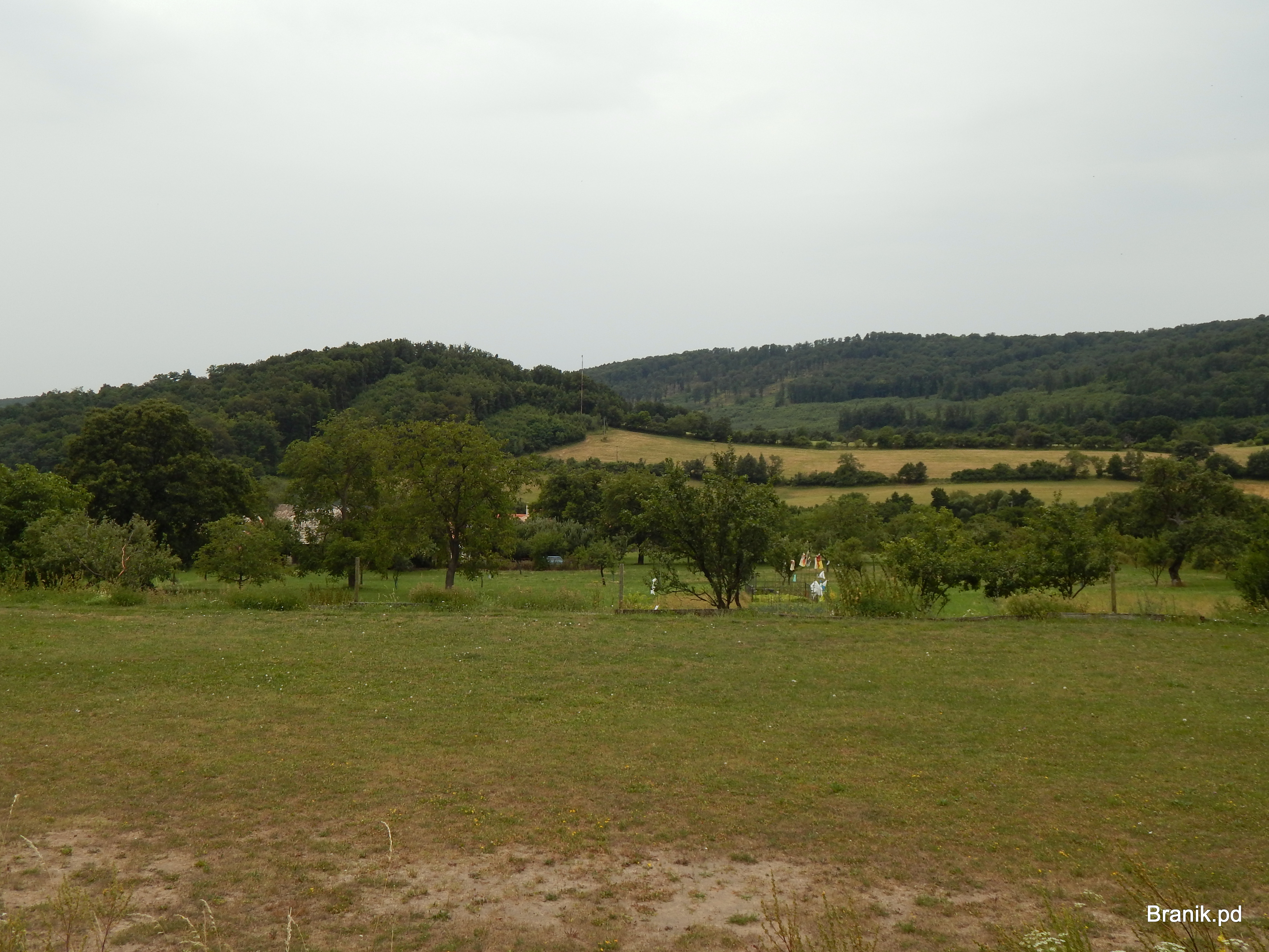 Žibritov